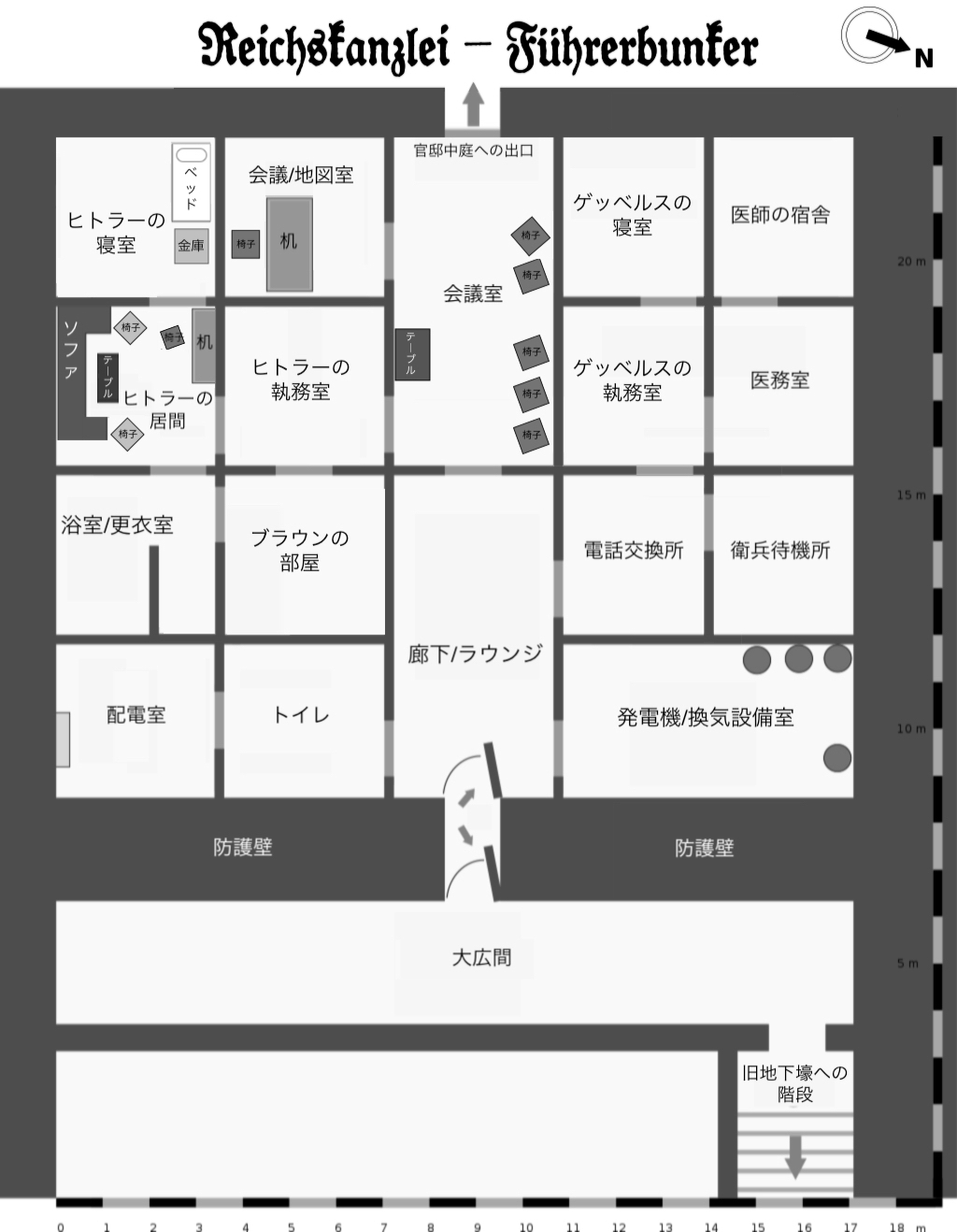 元ファイルFile:Reichskanzlei-Fuehrerbunker.pngおよびFile:Reichskanzlei-Fuehrerbunker.svgの改変作品